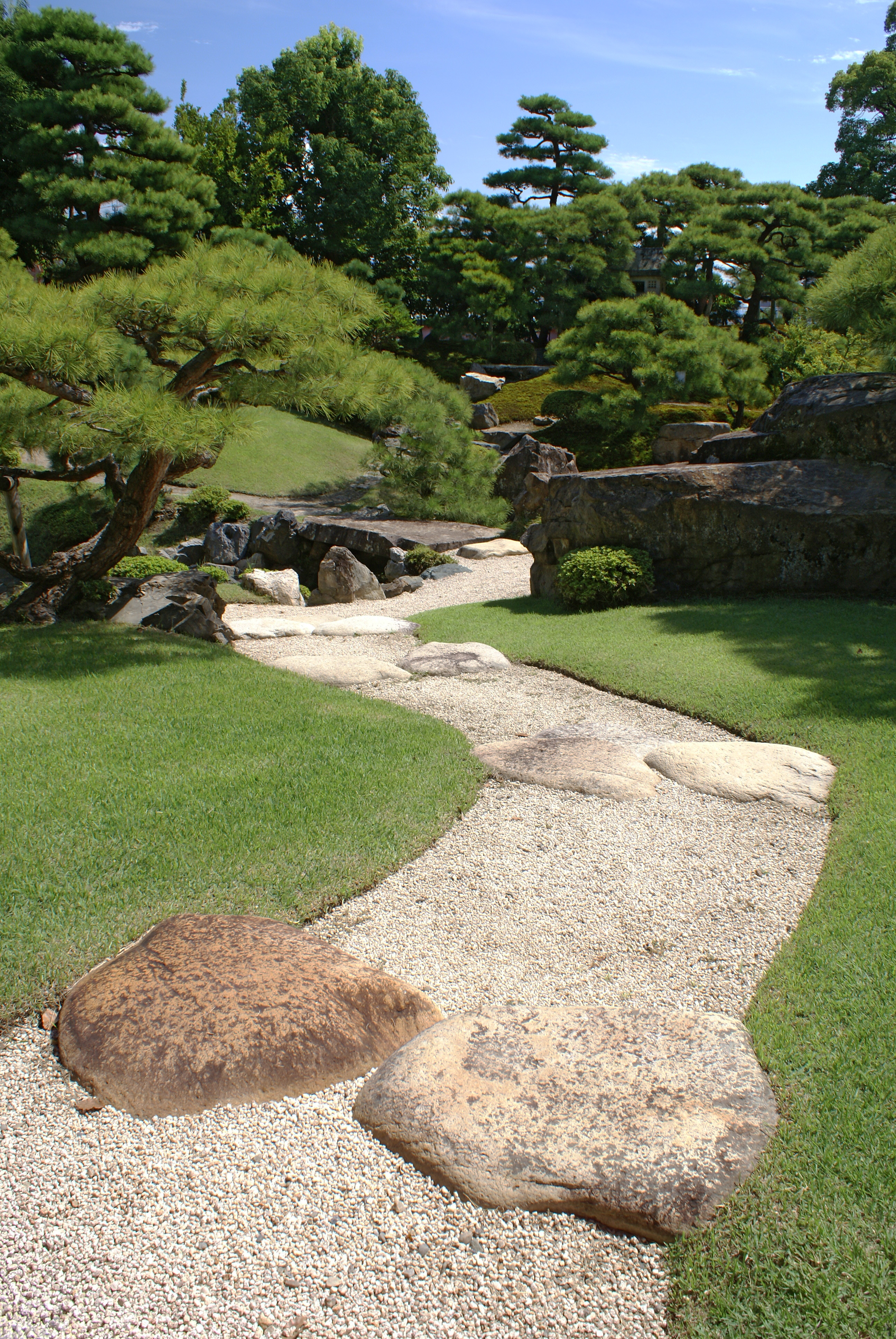 Keiunkan in Nagahama, Shiga, Japan